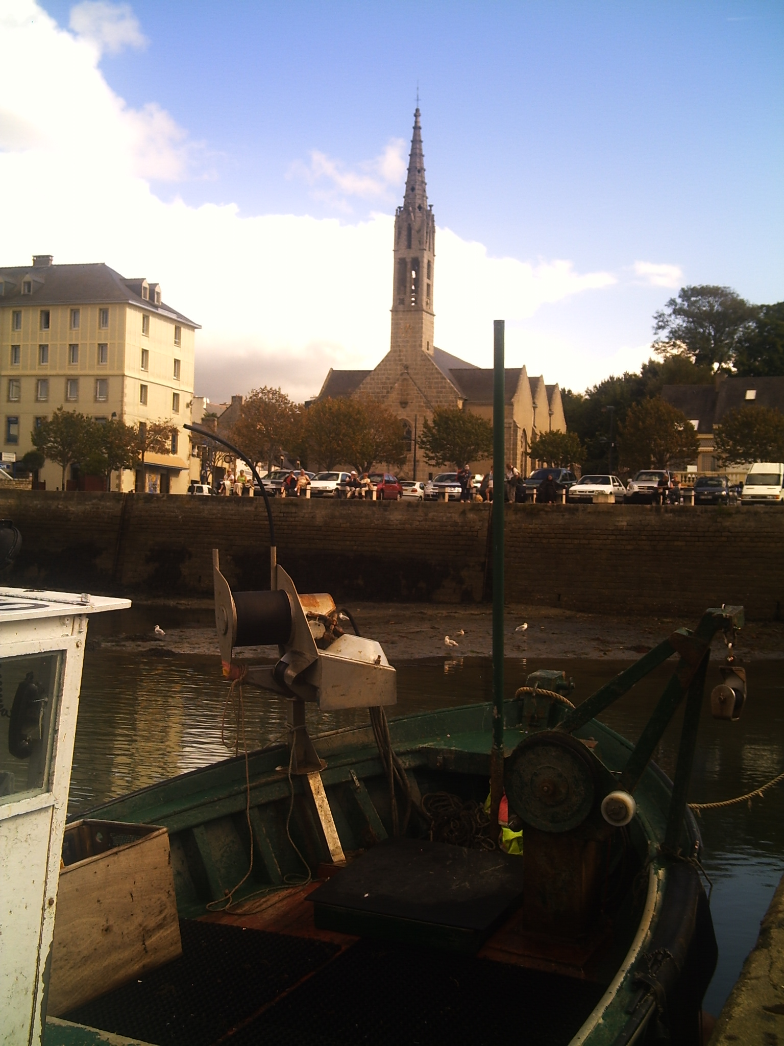 Église St-Thomas Becket à Bénodet